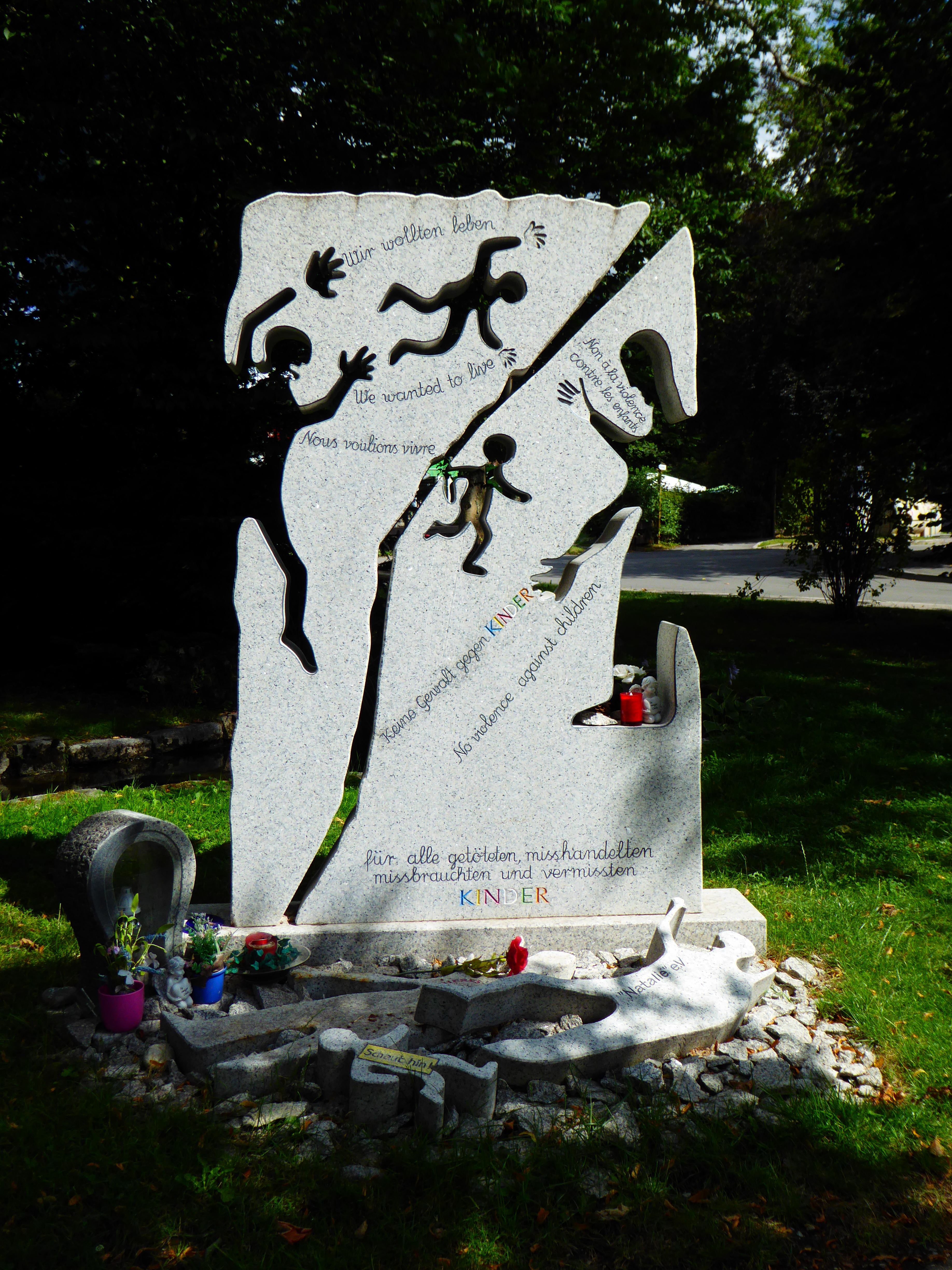 Gedenkstätte für Kinder in Oberstdorf: Am 19.10.2007 wurde die Gedenkstätte vom Opferschutzverband "FORUM GEGEN GEWALT" im Kurpark von Oberstdorf eingeweiht. Sie soll an Kinder und Jugendliche erinnern, die Opfer von Gewalt wurden. Quelle: - gestiftet von der Tabaluga Kinderstiftung